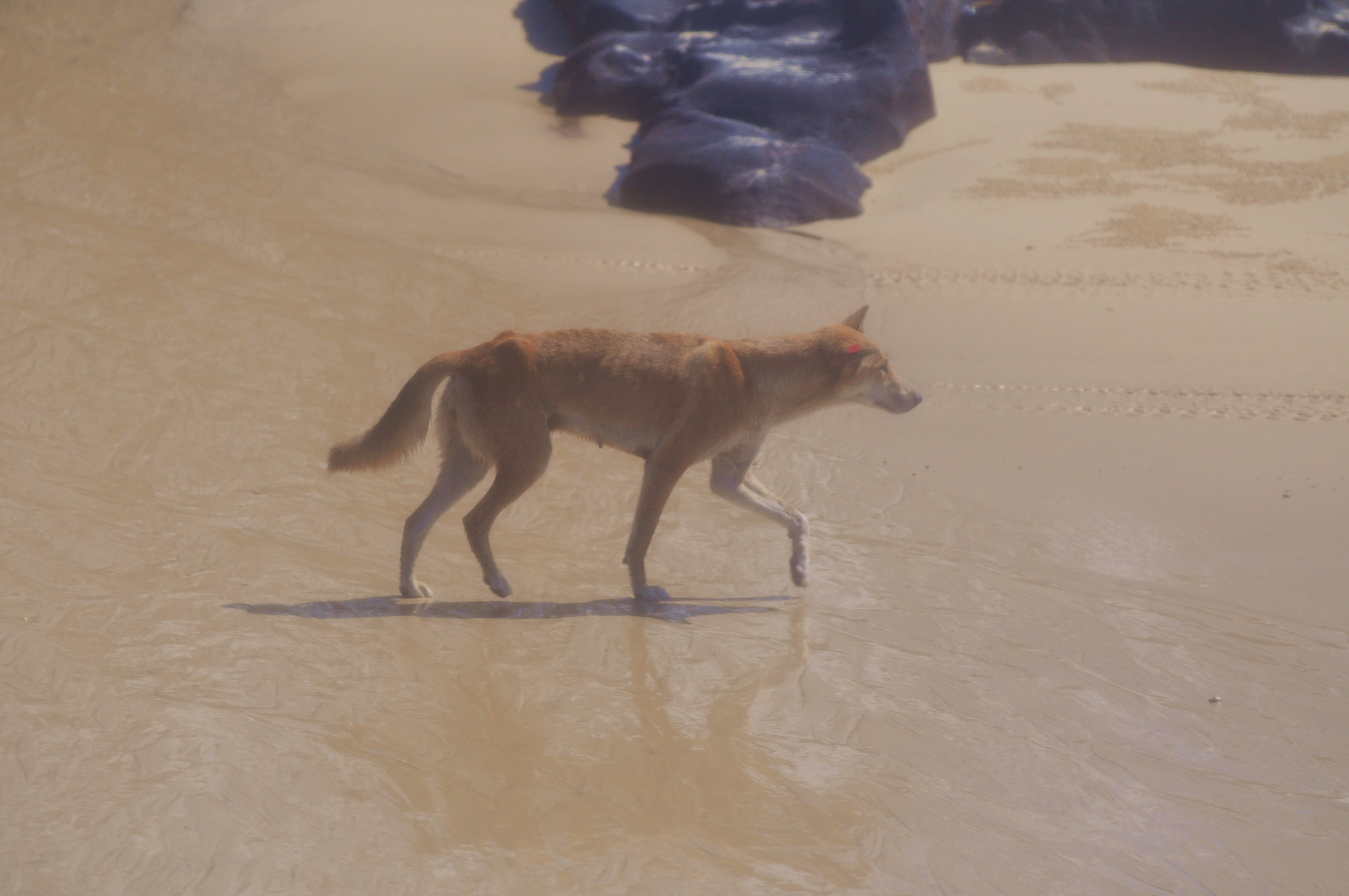 Beach Dingo